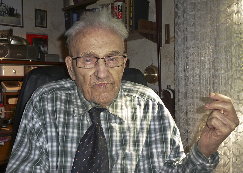 Erwin Jöris, deutscher NS-Widerstandskämpfer und Opfer des Stalinismus